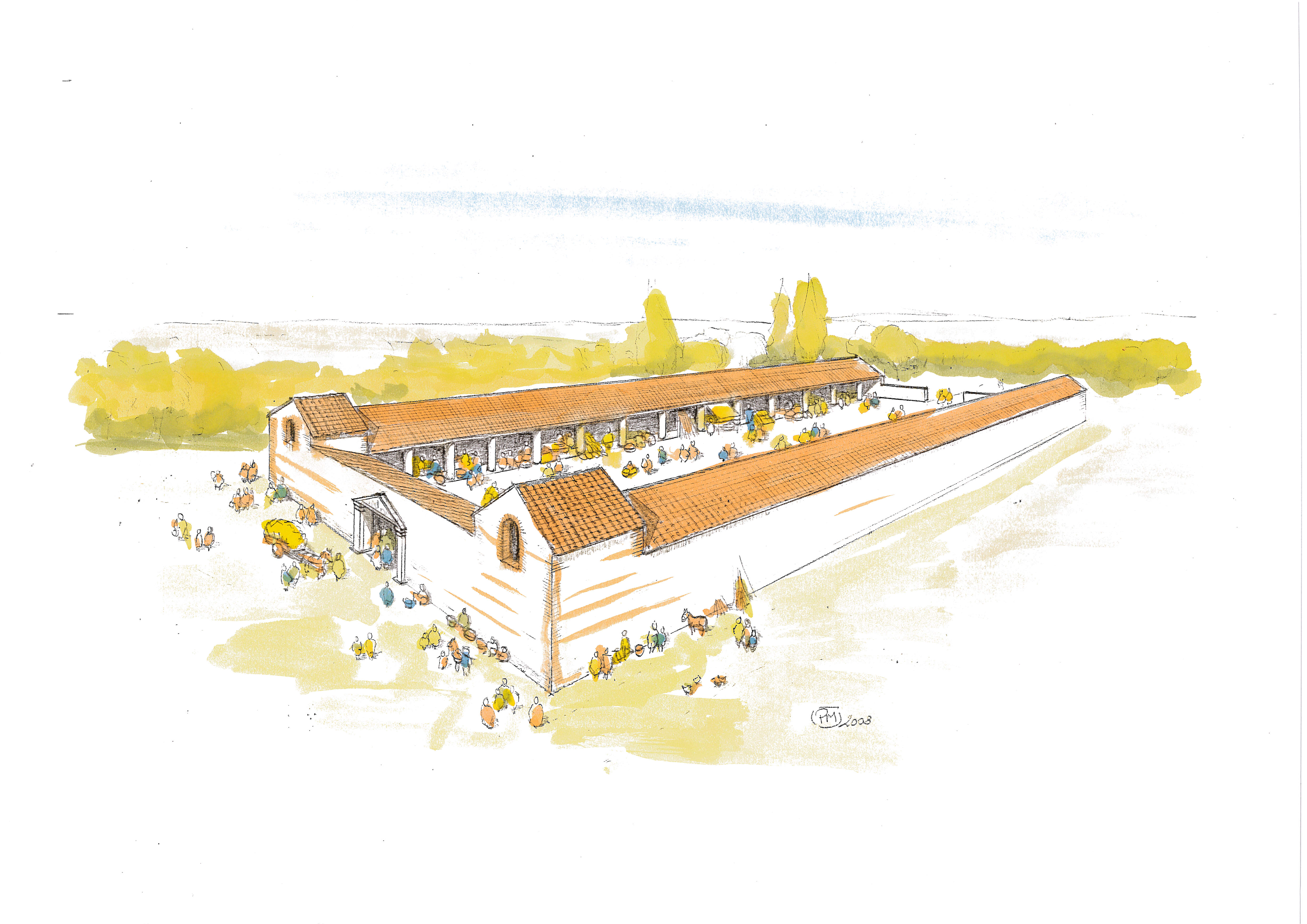 Proposition de restitution du marché-forum de Cherré. Dessin original de Pascal Mariette.